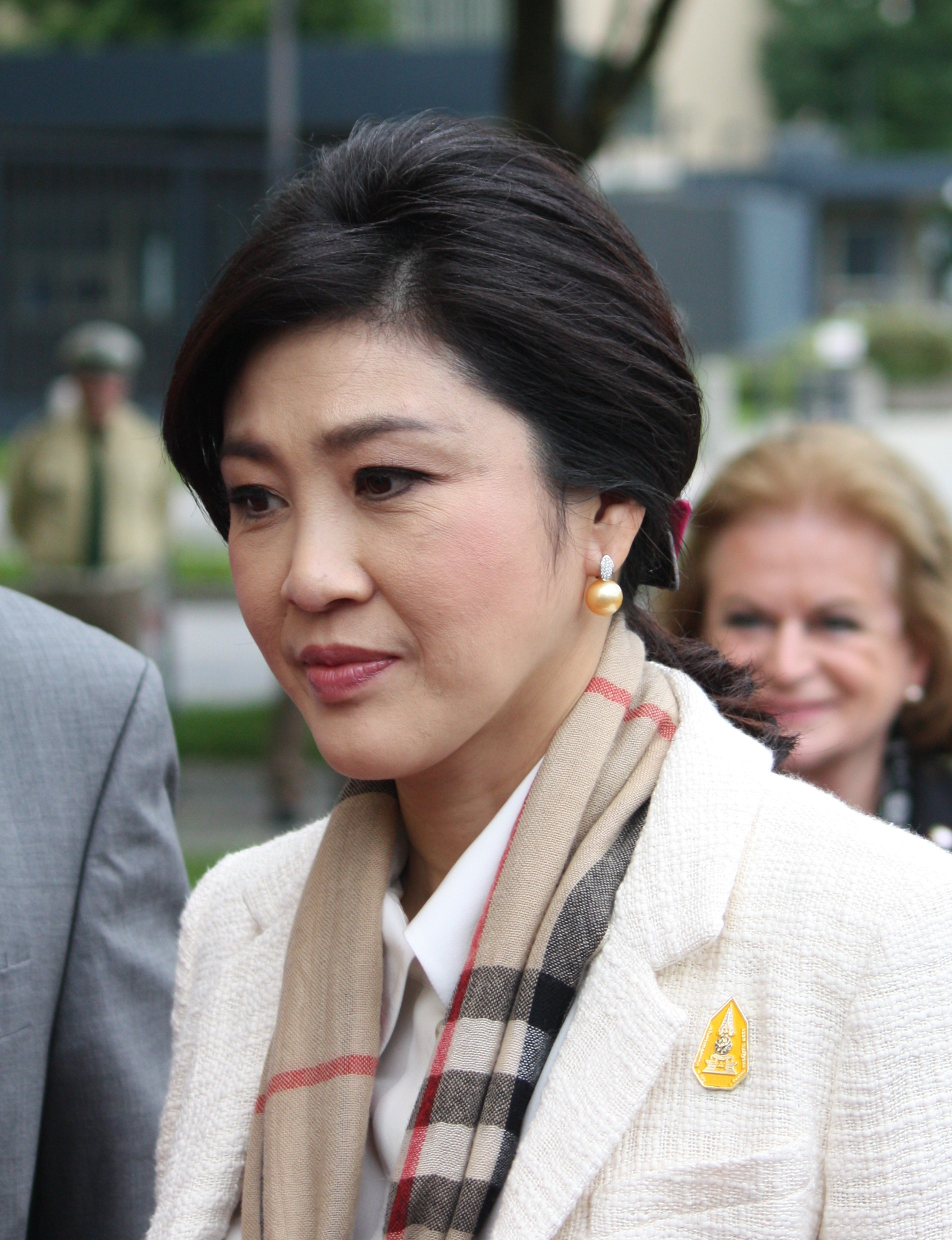 Die thailändische Premierministerin Yingluck Shinawatra in München